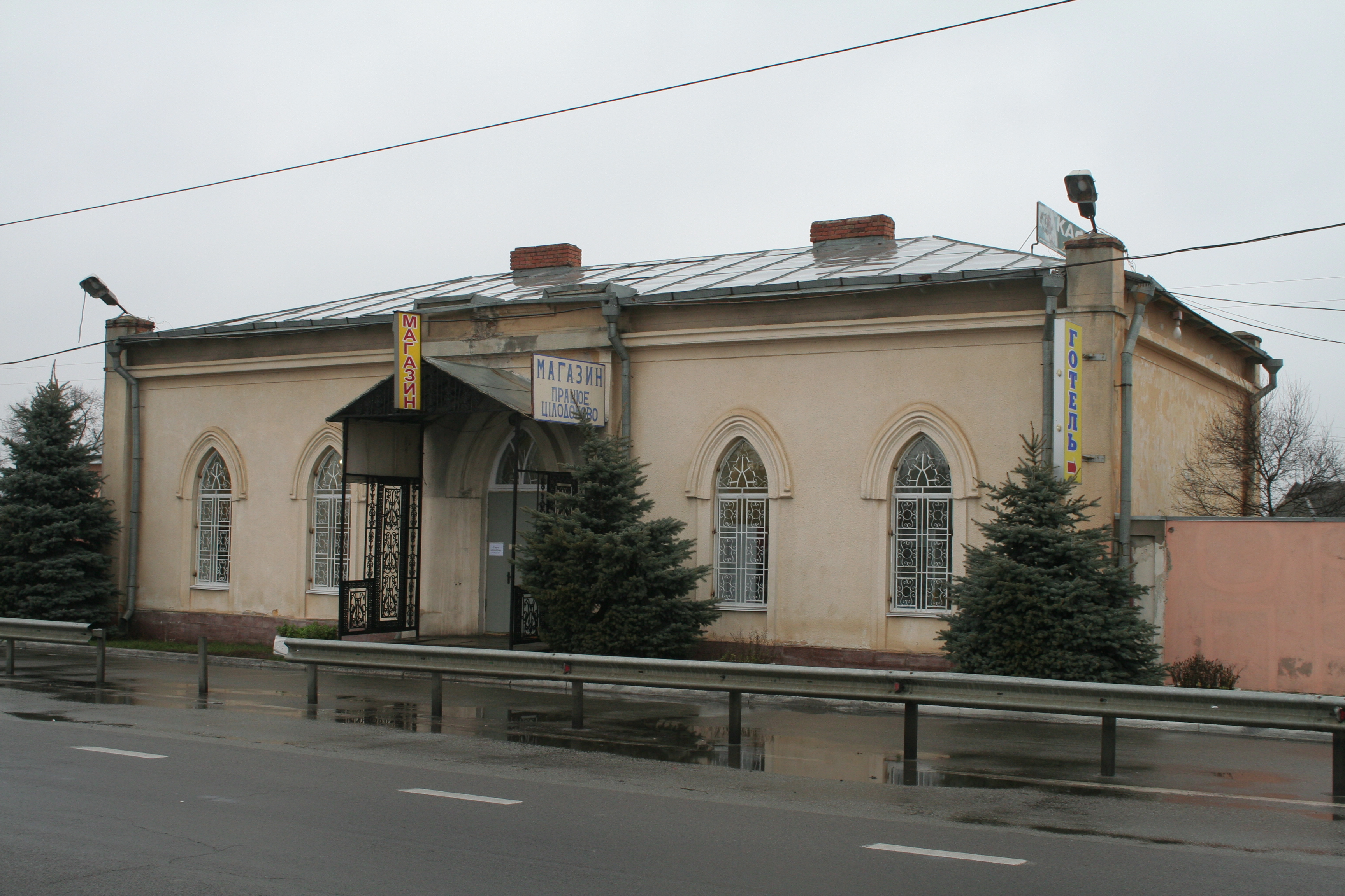 шосе Київ — Житомир 32-й км, Гурівщина, Поштова станція №2, загальний вигляд, ракурс